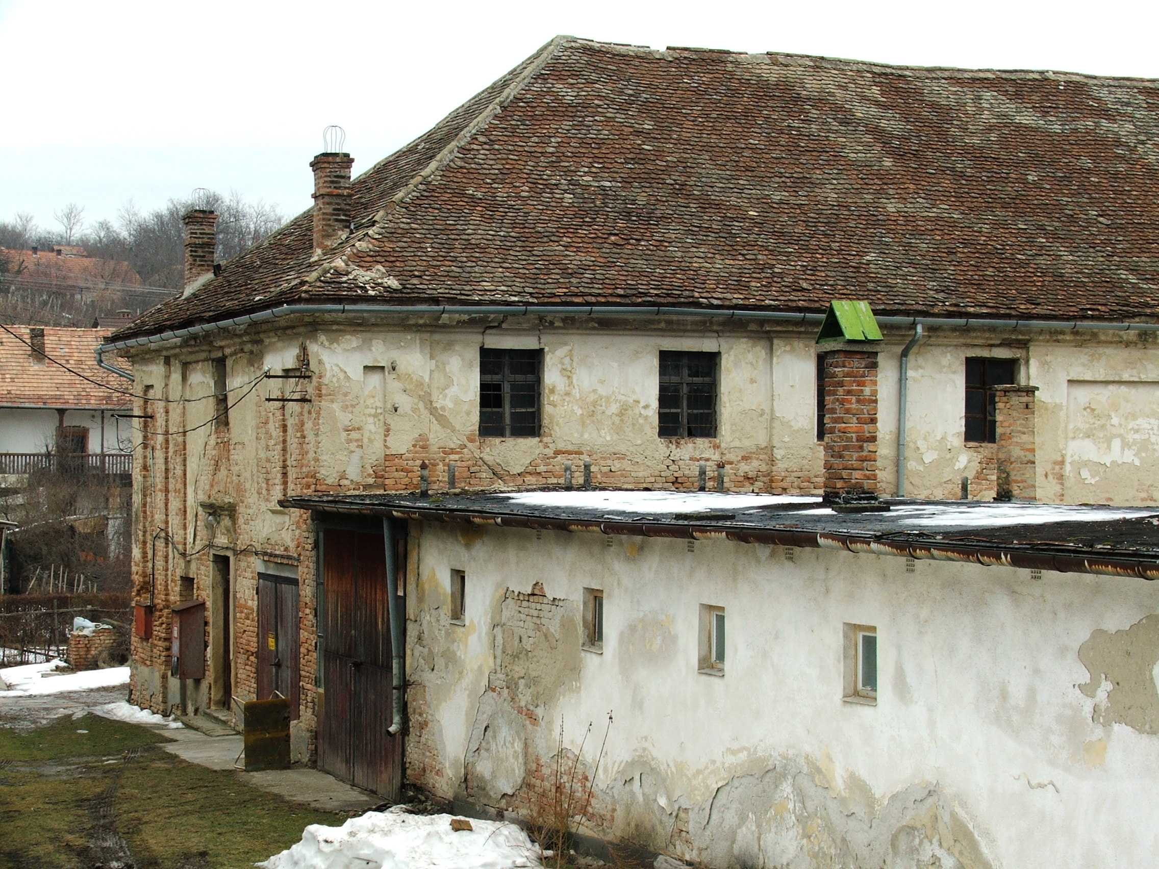 zsinagóga, Hőgyész This is a photo of a monument in Hungary. Identifier: 8634